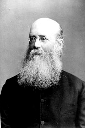 Robert von Zimmermann, český a rakouský filozof